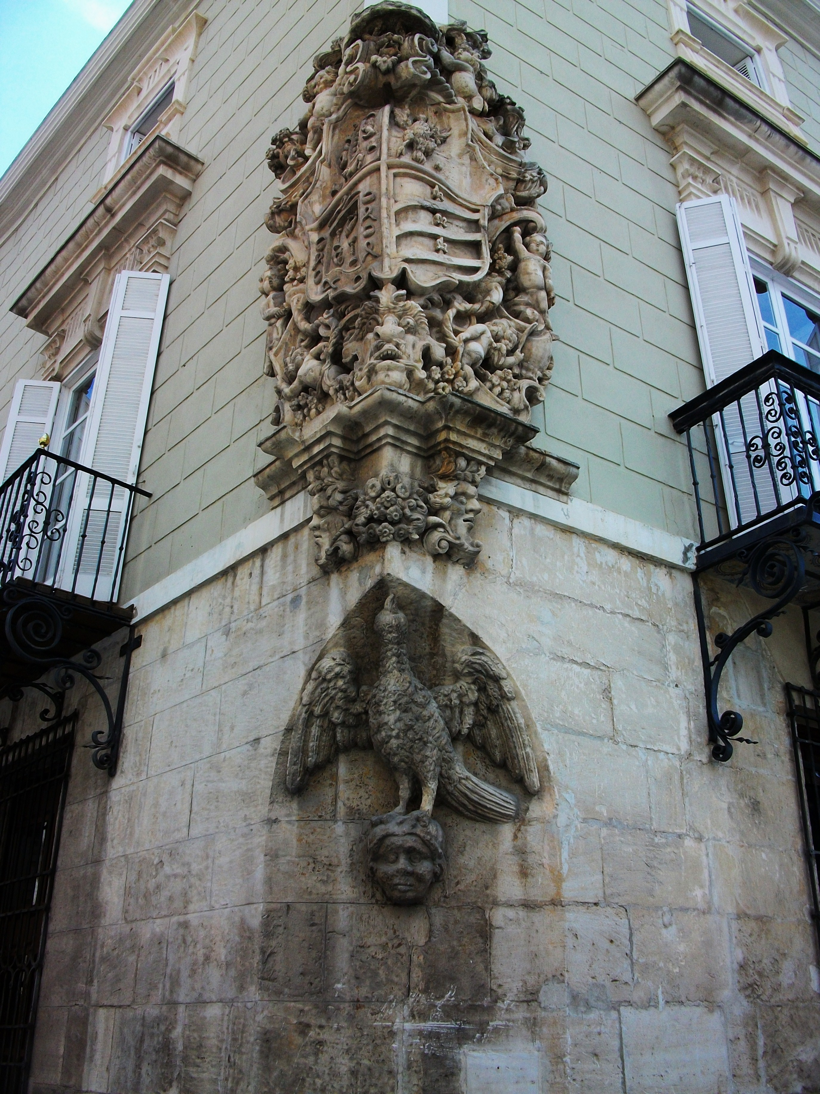 Escut a la cantonada del "pavo", ajuntament d'Oriola (palau del marqués d'Arneva).